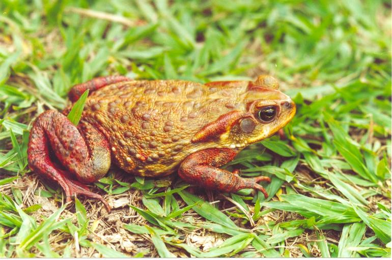 Bufo rubescens